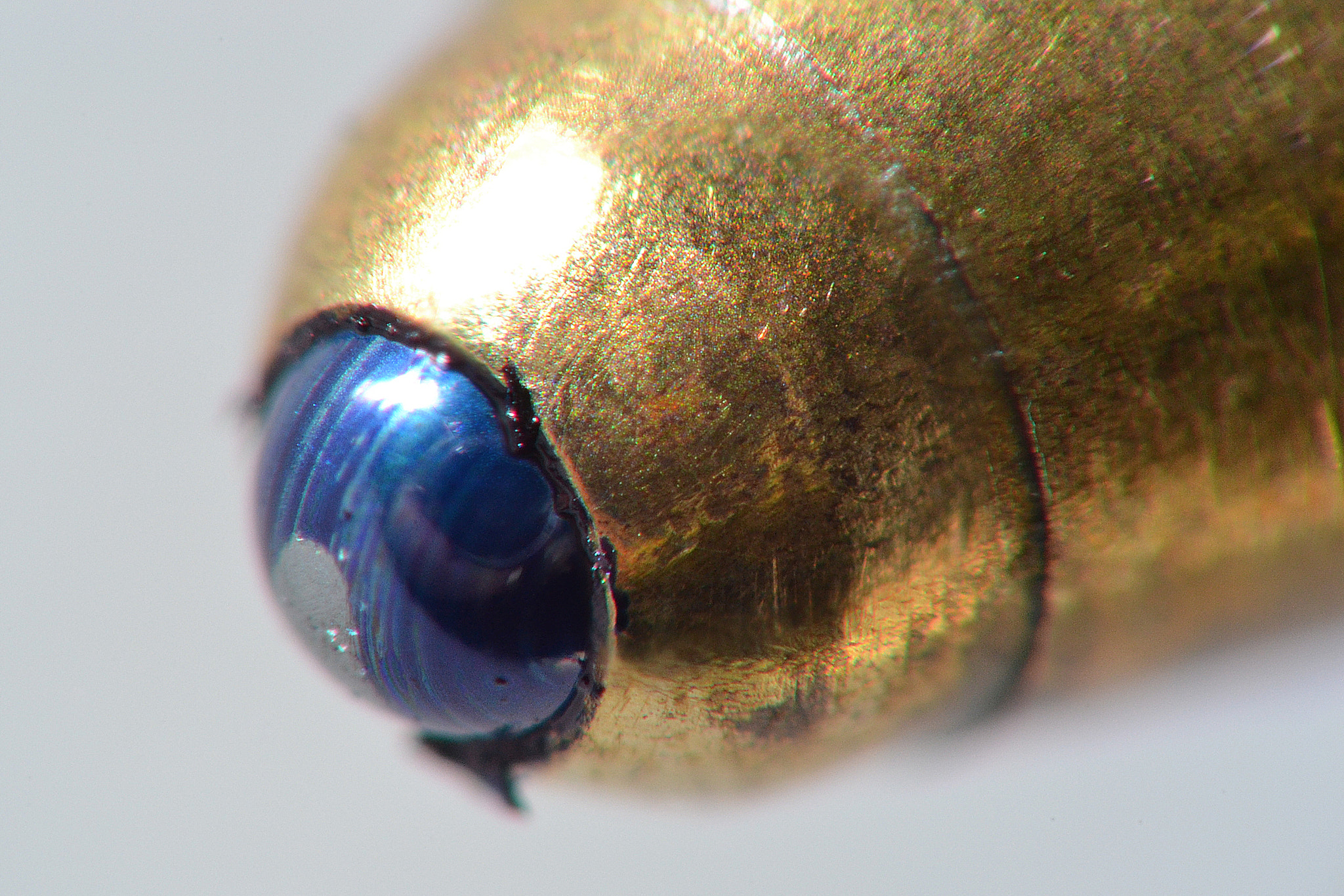 500px provided description: Bic [#pen ,#bic]